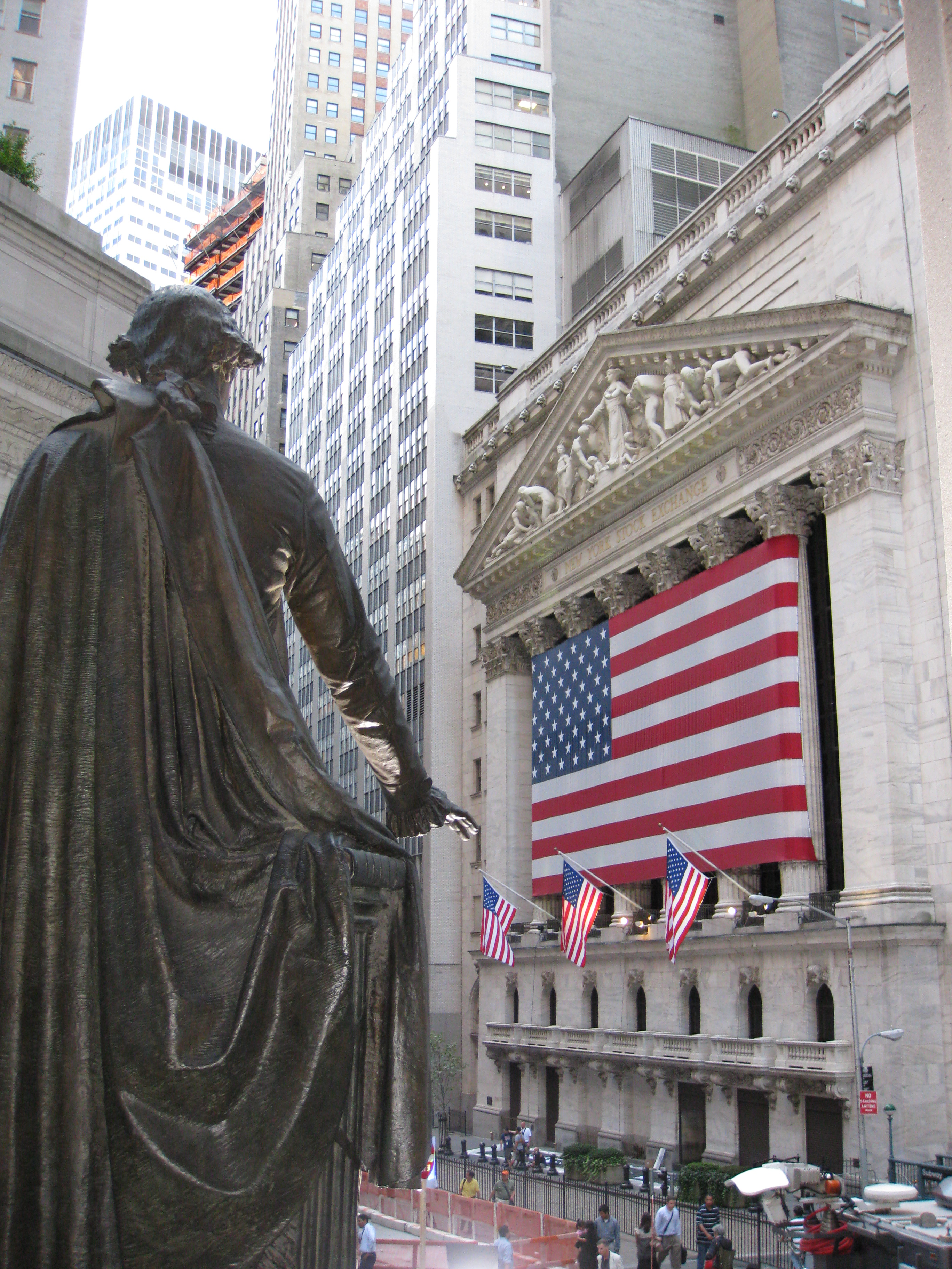 Diese Bild zeigt die New Yorker Wall Street am Tag des Leeman Brothers-Ende. Ich war live dabei!